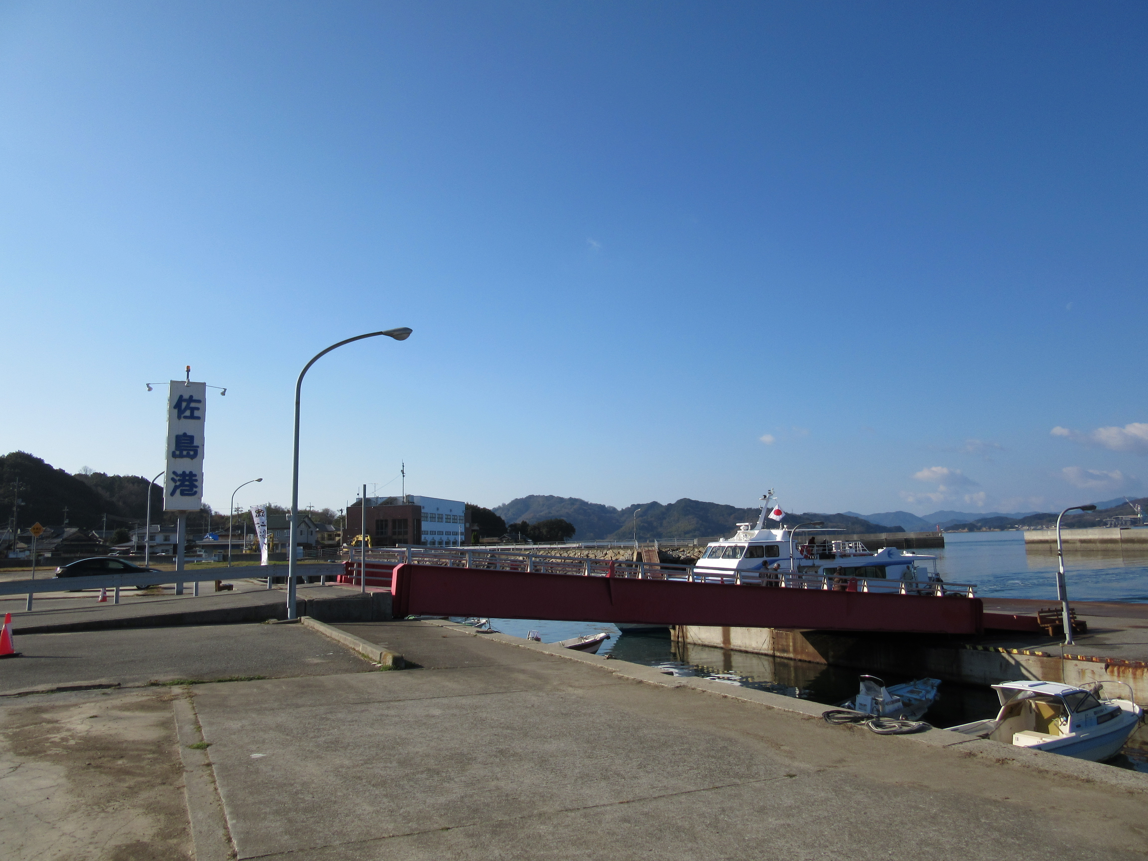 佐島港全景